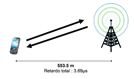 Representacion grafica del retraso de la señal